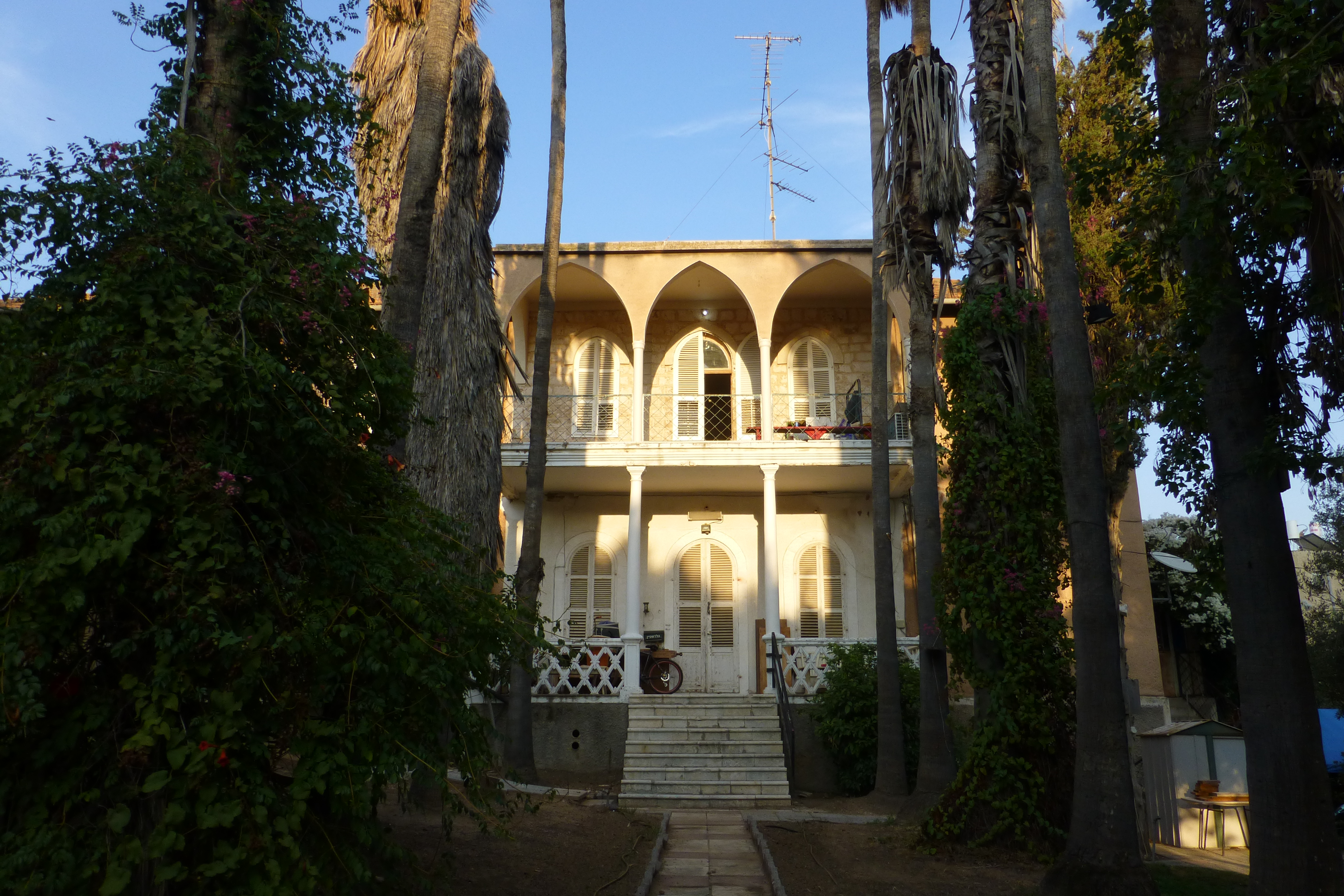 ברחוב מנוחה ונחלה התגוררו העשירים של אותם ימים ומשום כך הוא כונה רחוב המיליונרים. בתים לדוגמה: בית זקס - מס' 54, בית ברוידא - מס' 56.